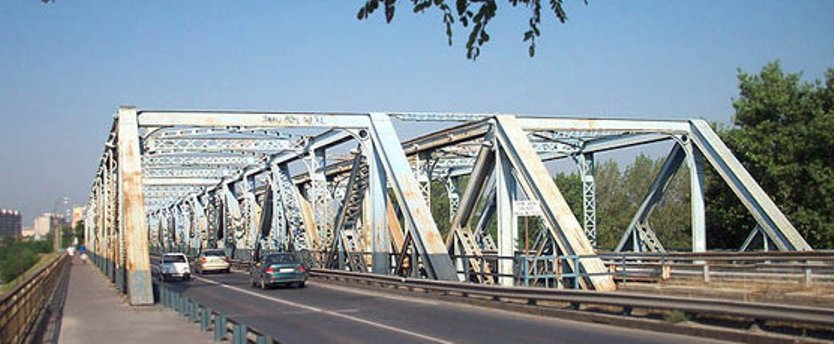 Gubacsi híd